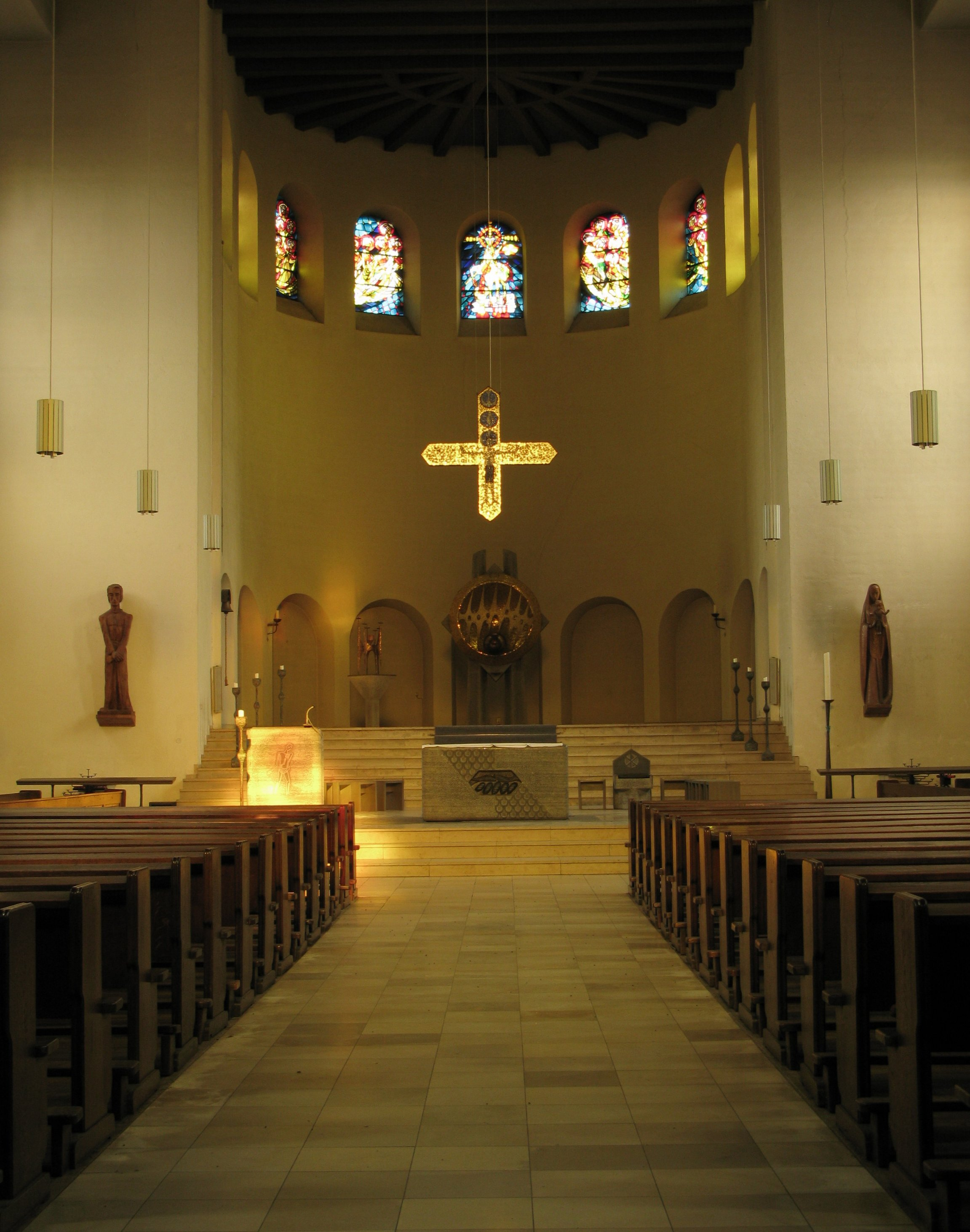 Dreifaltigkeitskirche Münster Schiff innen